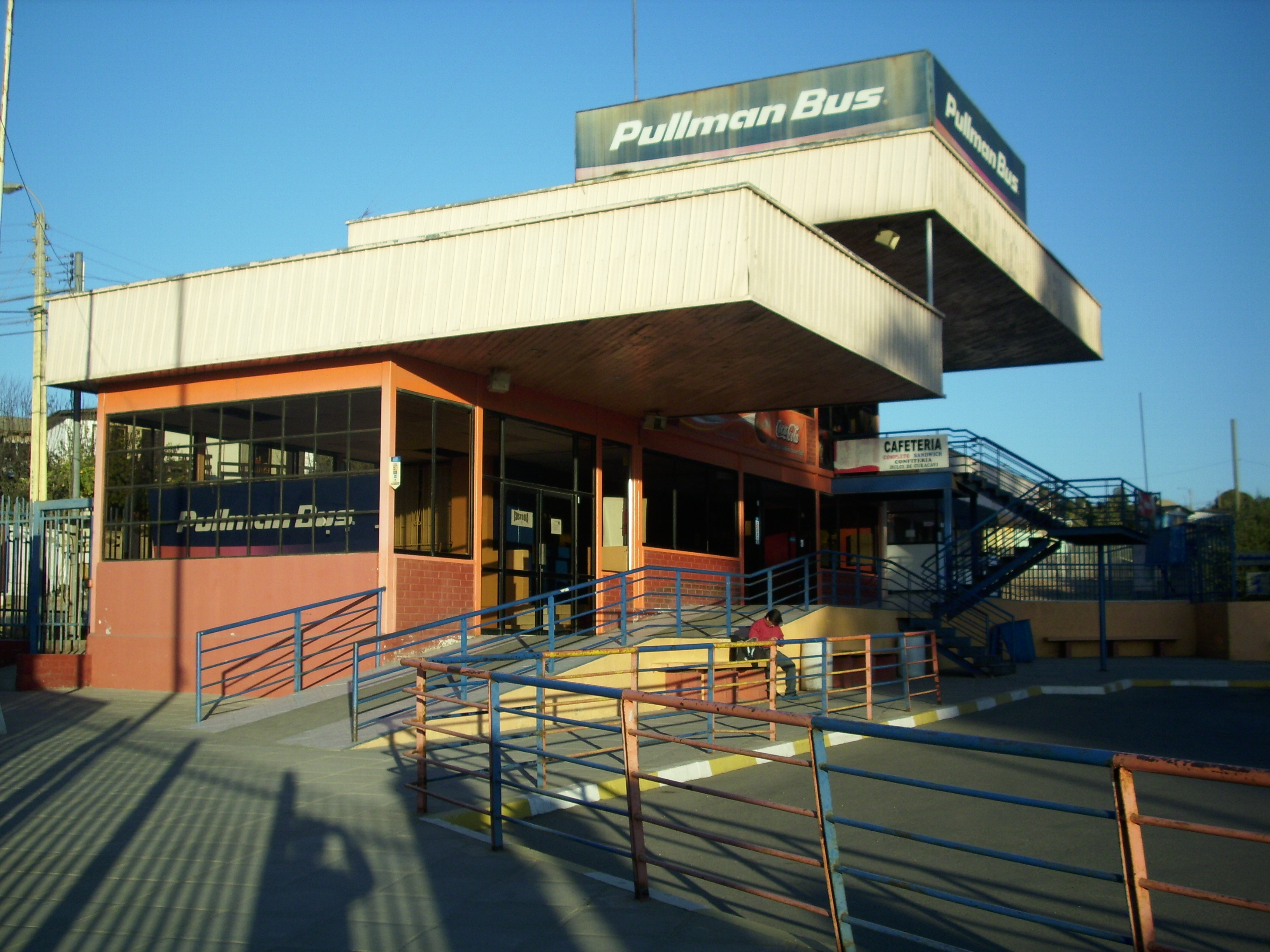 La terminal de buses de la empresa Pullman Bus en avenida Huallilemu S/N, en la comuna de El Quisco. V Región de Valparaíso, Chile.